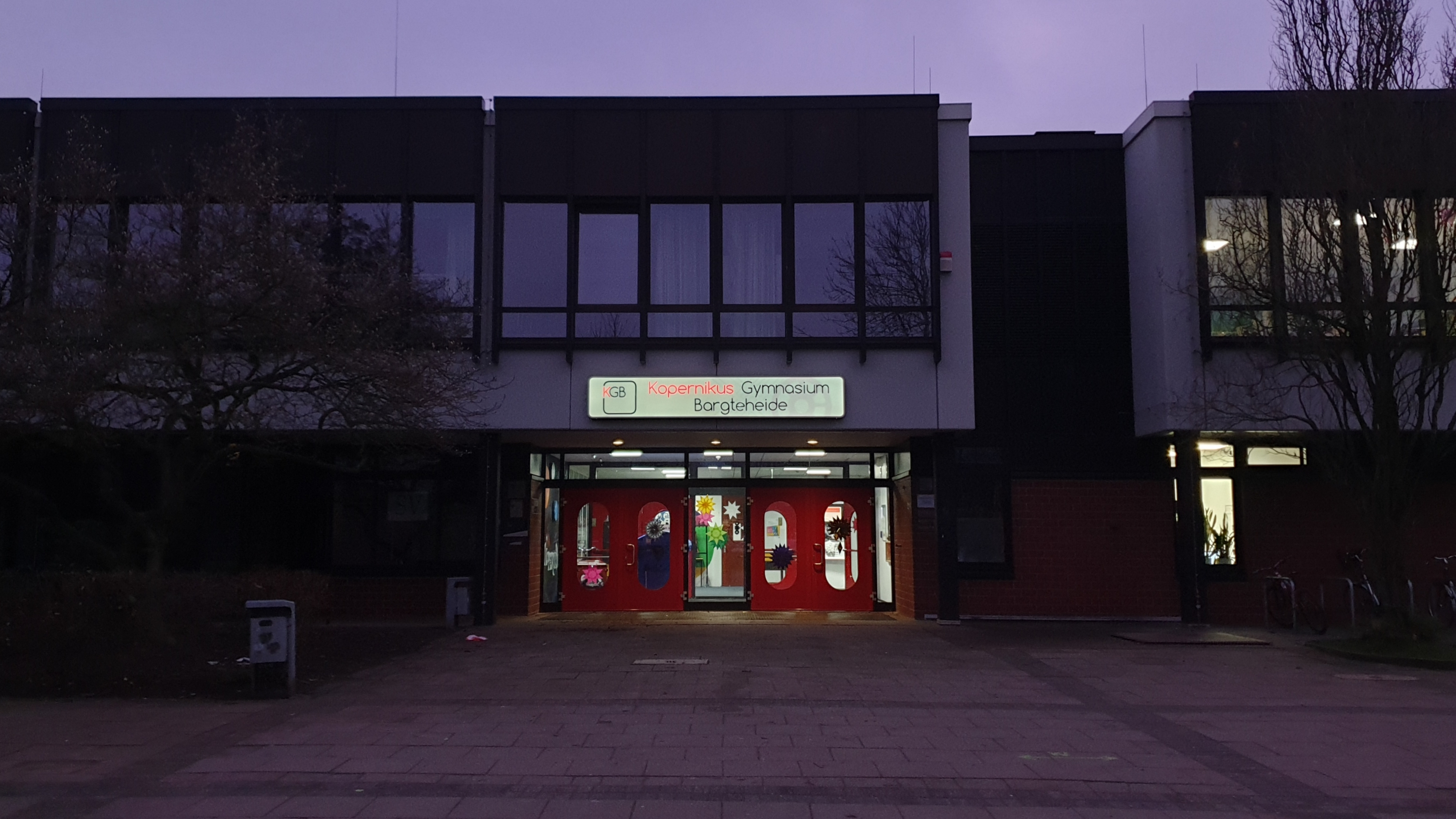 Eingang des Kopernikus Gymnasiums am Abend